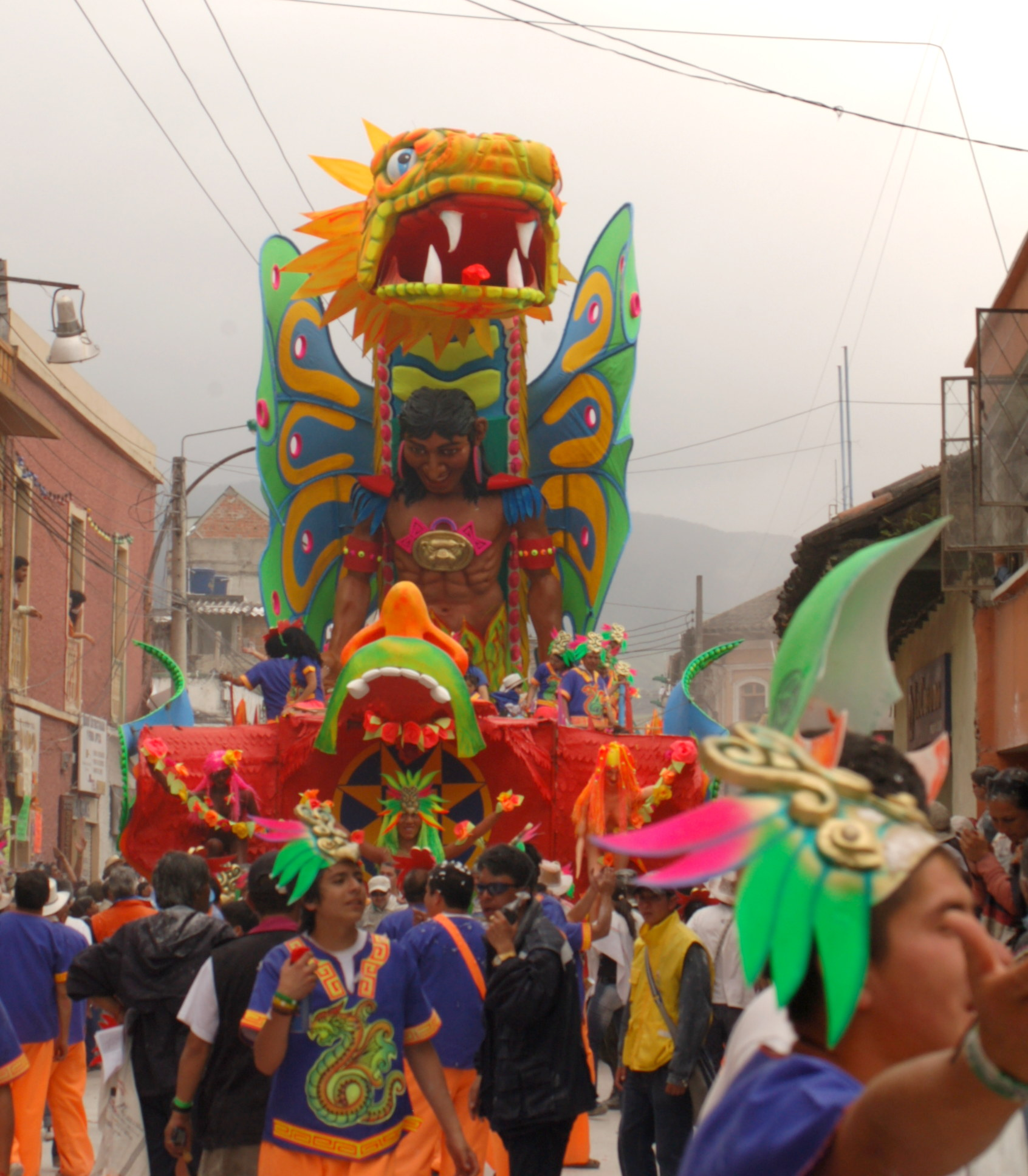 Detalle de "Tinkunni", carroza ganadora del desfile Magno de Blancos del 6 de Enero de 2008, elaborada por Jarol Roberto Otero